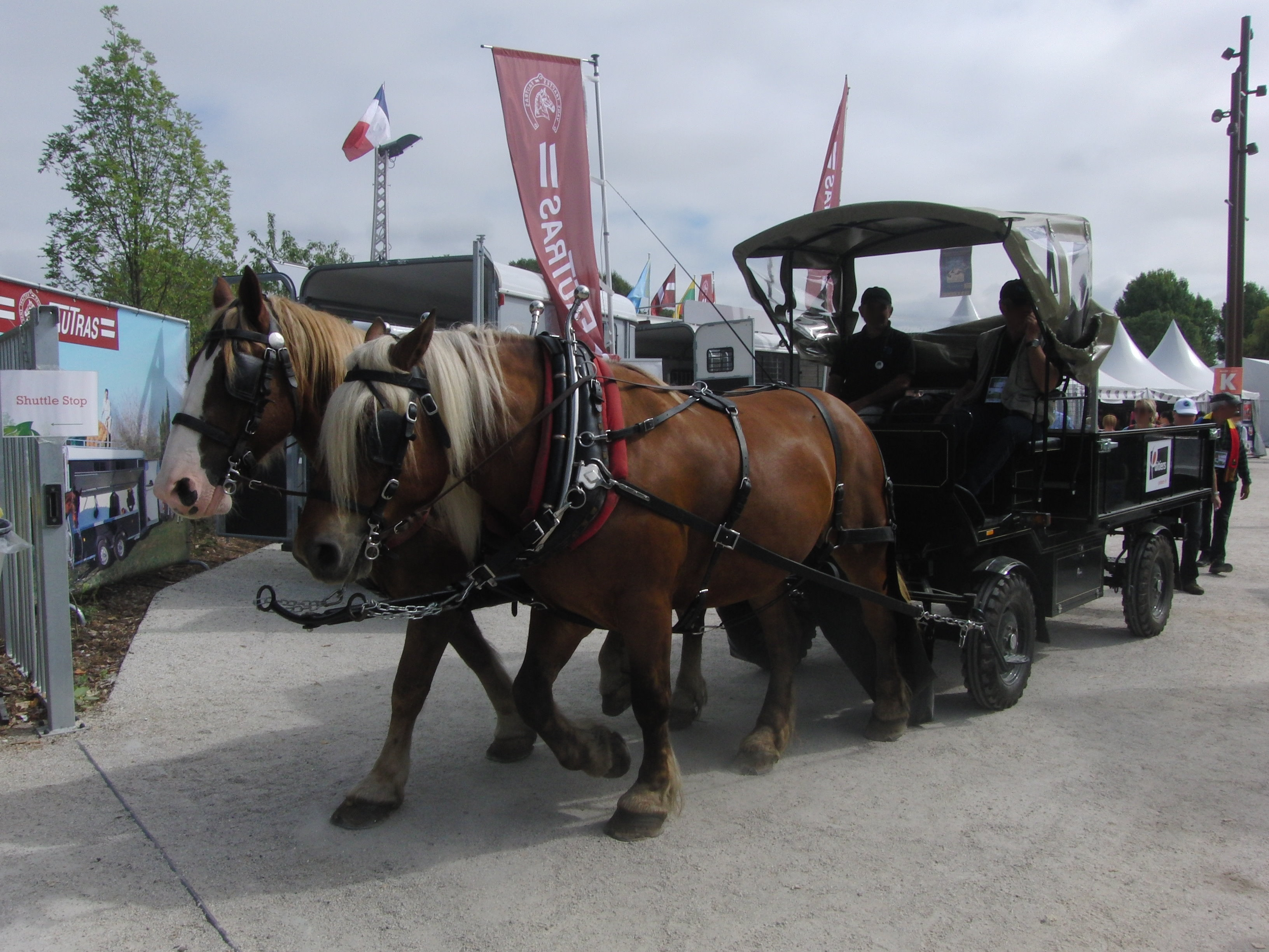 Jeux équestres mondiaux de 2014 - Ramassage des déchets dans le village des jeux par deux chevaux de trait (un breton et un comtois)